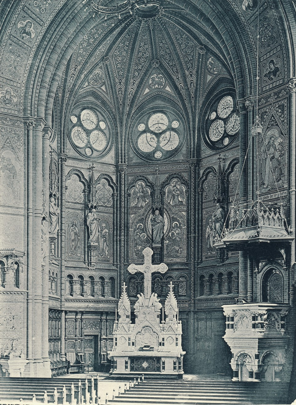 Altarraum der ehemaligen Georgenkirche in Berlin-Mitte mit den von der Firma Puhl & Wagner ausgeführten Glasmosaiken, 1898 nach Plänen von Johannes Otzen erbaut.